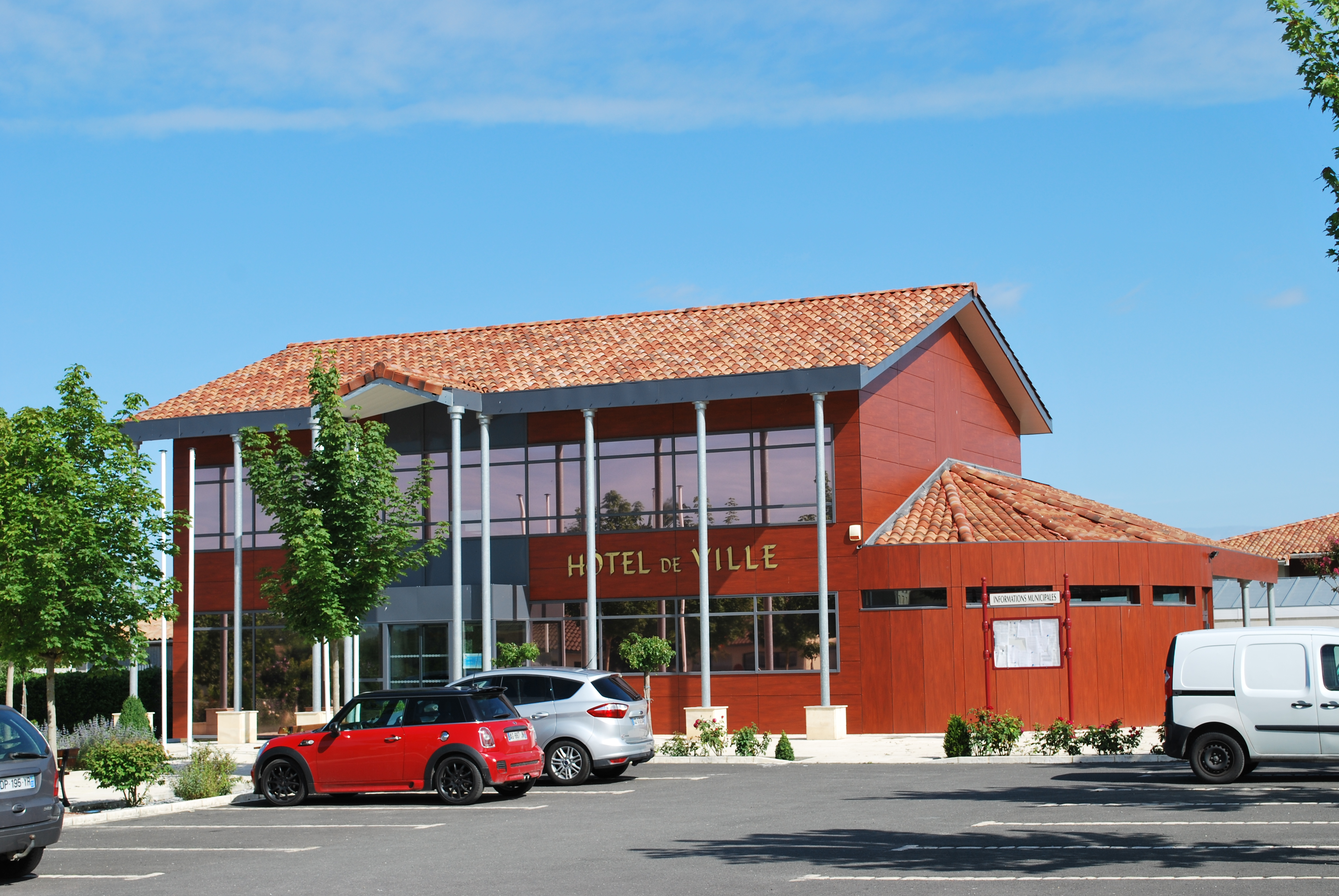 La Lande-de-Fronsac